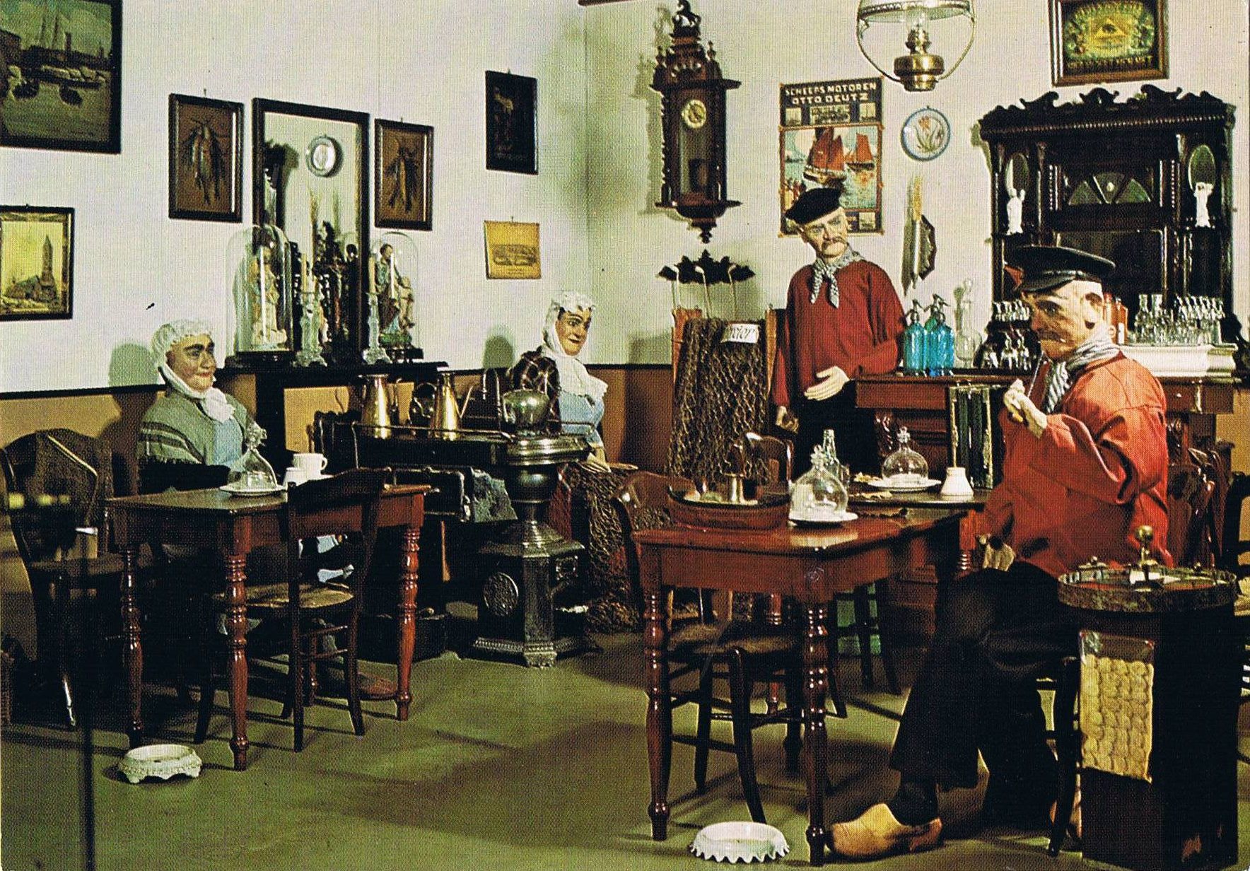 Ensemble de pêcheurs dans un café